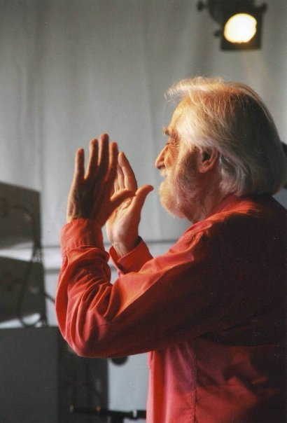 Jean-Claude Deret de profil